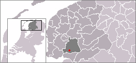 Locatie van Sint Nicolaasga, zelf gemaakt uit sjabloon van Wikipedia-gebruiker Mtcv